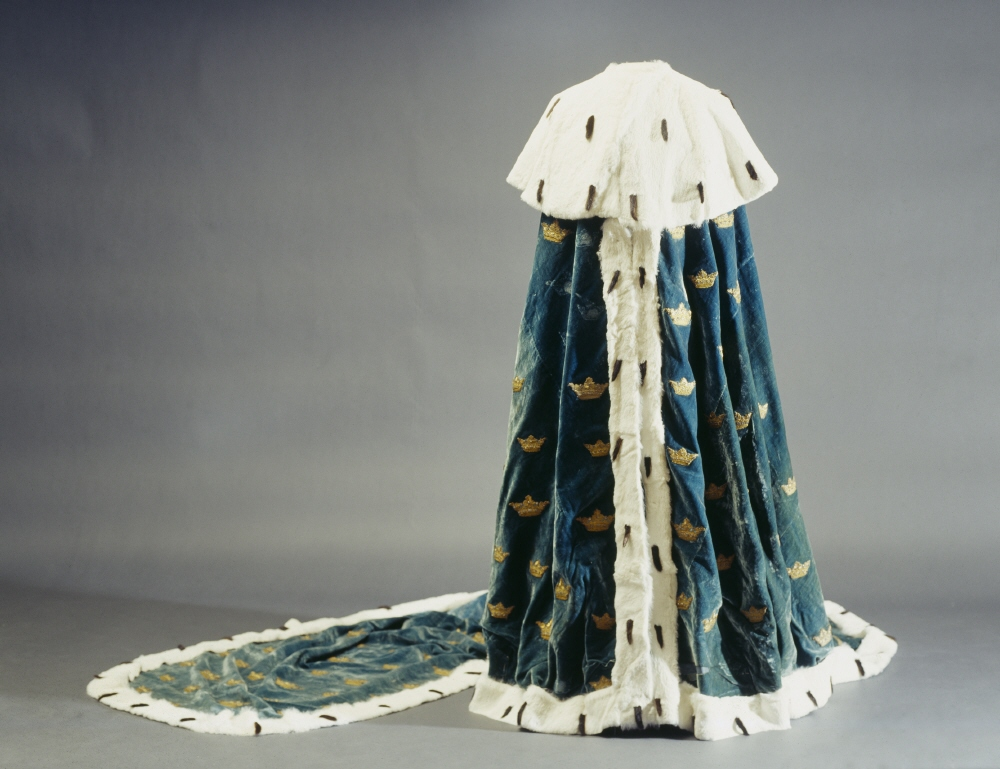 Furstlig mantel av ljust blå sammet med påsydda broderade guldkronor. av varierande storlek. Först tillverkad för Sofia Magdalena 1771. Sedan använd av Hedvig Elisabeth Charlotta (första gången vid bröllopet 1774) och slutligen av Desideria som kronprinsessa. I livrustkammaren, inventarienummer 31440 (3522)